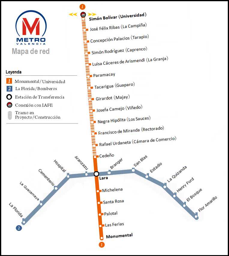 Red del Metro de Valencia (Venezuela) en 2012